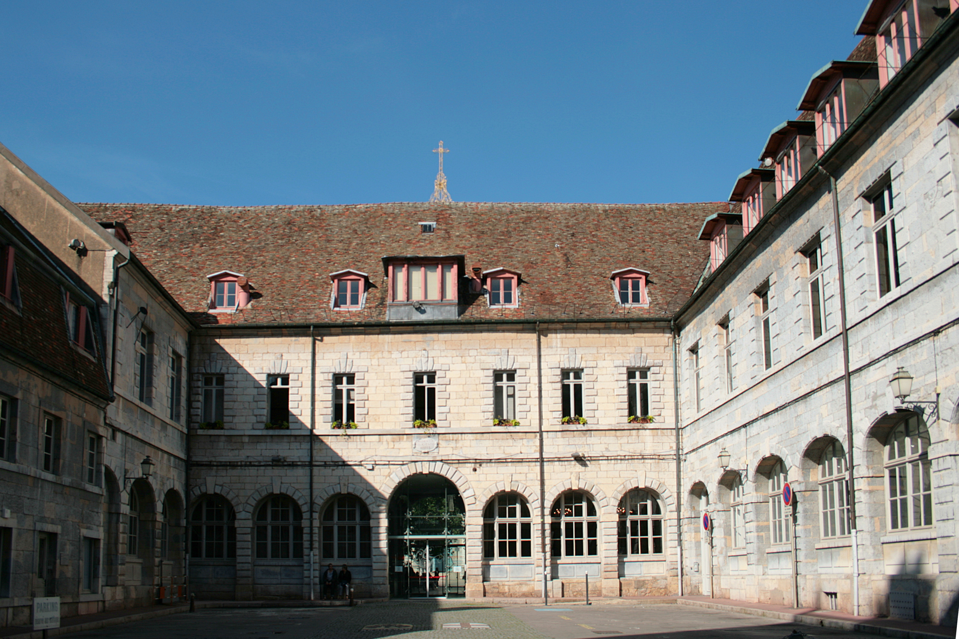 Besançon (Doubs - France), place de la 1ère Armée Française, 2 - Cour de l'ancien hôtel de ville (1393) remodelé et agrandi entre 1569 et 1573 par l'architecte Richard Maire.